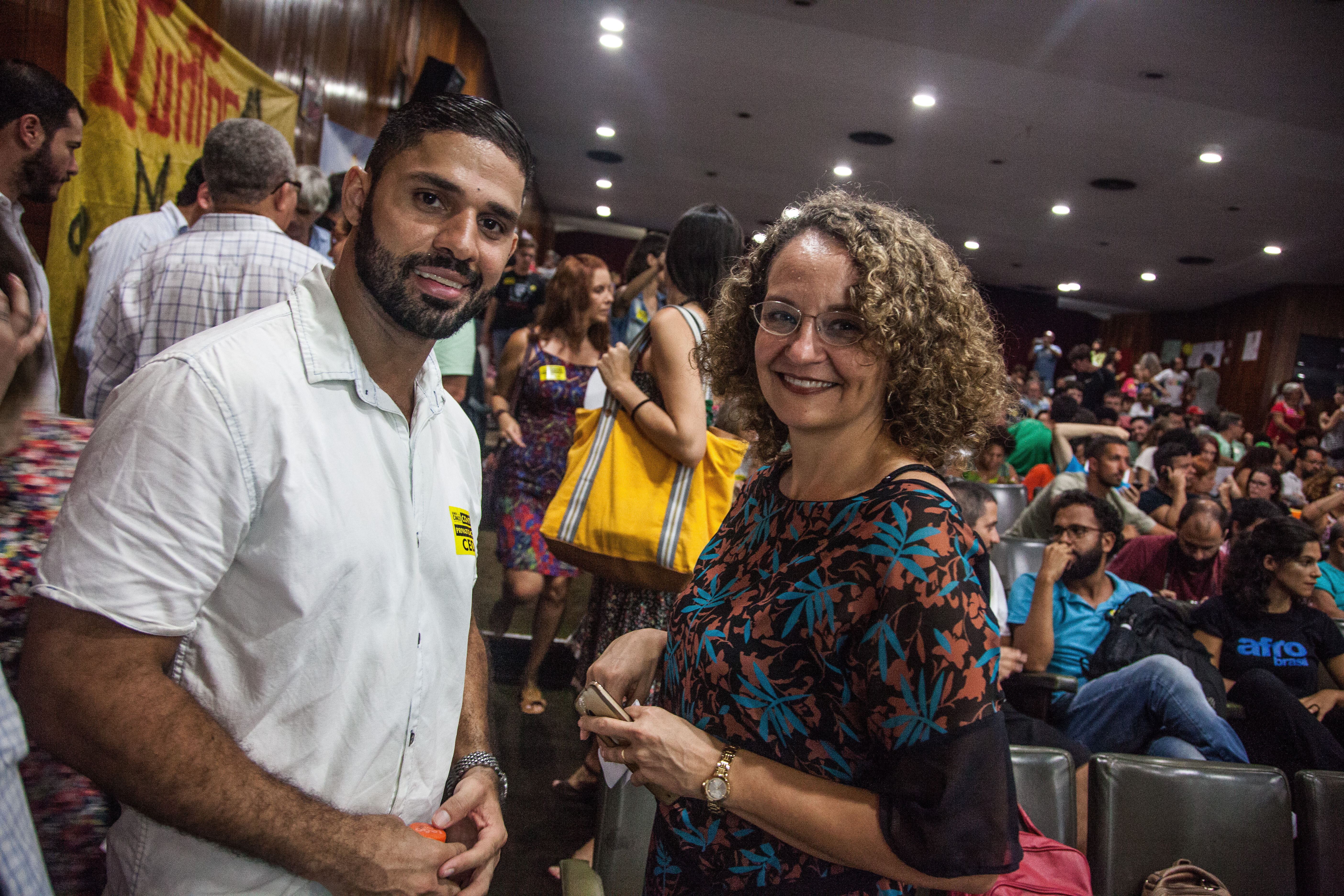 David Miranda e Luciana Genro durante o Ato em Defesa do Mandato de Jean Wyllys • 06/22/2017 • Rio de Janeiro RJ